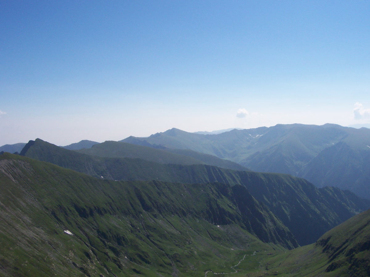 Galesescu si Dara - Dara-csúcs